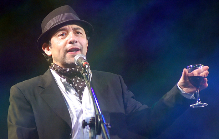 Daniel Muñoz Bravo (nacido en San Fernando, el 11 de febrero de 1966) es un actor y cantante de cuecas chileno.. En la comuna de Maipú miles de personas festejan el Bicentenario de nuestra patria con numerosos artistas, bailes y colores durante la 4ta Semana Chilenidad.